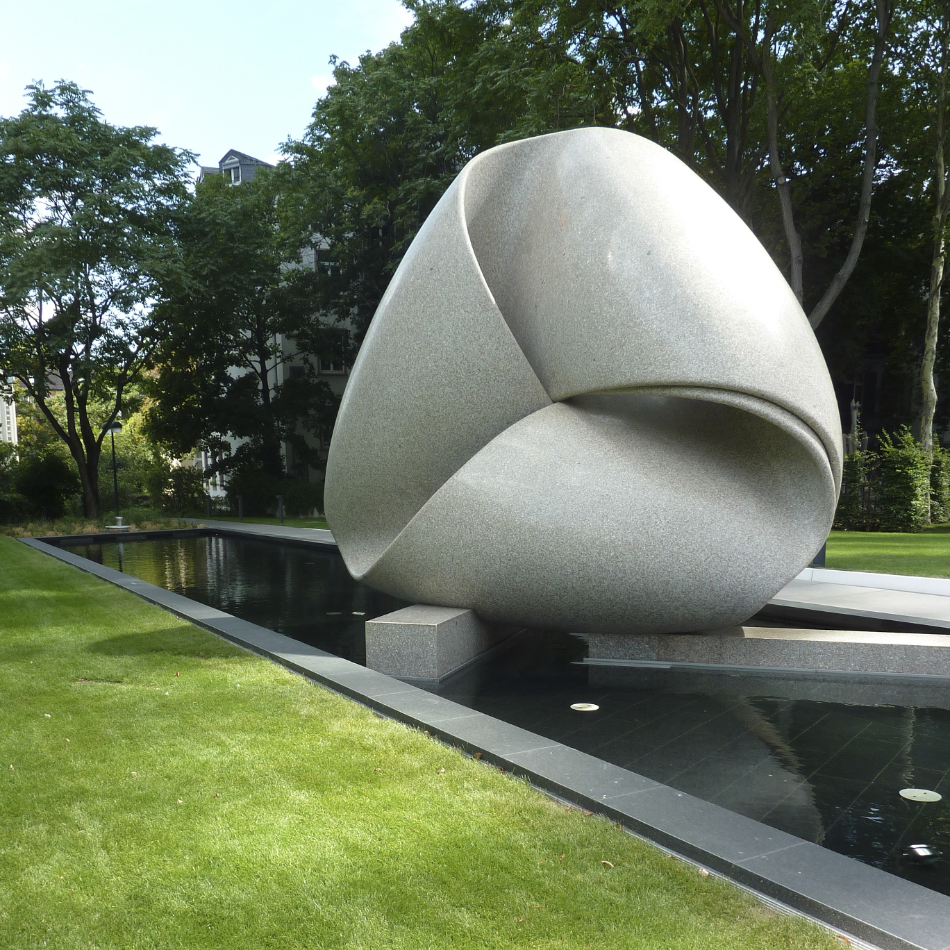 Kontinuität (auch „Koloss von Frankfurt“) ist eine 1986 vollendete Skulptur des schweizer Bildhauers Max Bill (1908–1994). Das Kunstwerk, das mit 80 Tonnen Gewicht zu den schwersten Granitskulpturen der Welt zählt, steht in der deutschen Stadt Frankfurt am Main an den Hochhaus-Zwillingstürmen der Deutschen Bank. In den Jahren 2007 und 2011 wurde die Skulptur jeweils um einige Meter von ihrem ursprünglichen Standort im Vorhof der beiden Hochhäuser versetzt; Ihr gegenwärtiger Standort ist eine Grünanlage neben der Deutsche-Bank-Zentrale